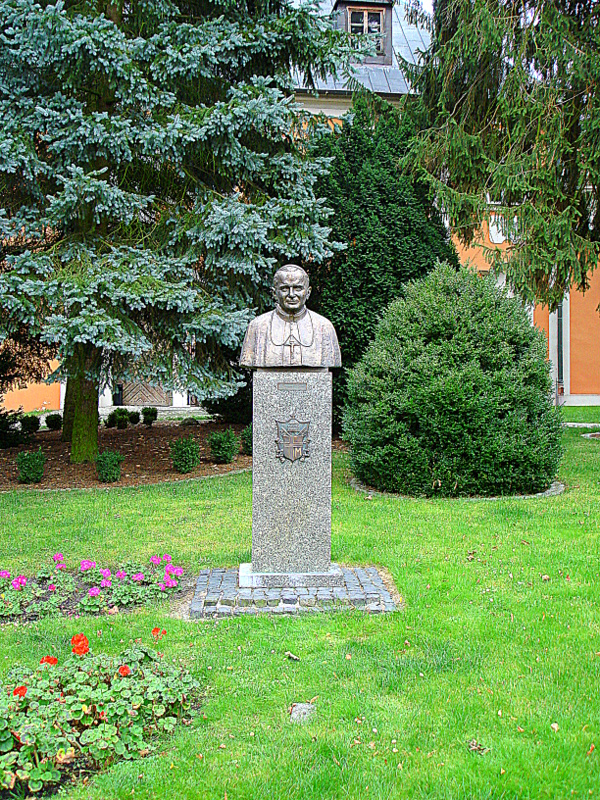 Gościkowo - zespół klasztorny cystersów w Paradyżu, XIII-XVIII w - teren klasztoru (dawne ogrody klasztorne), ogrodzenie kościoła i klasztoru mur kam. XVIII w. (zabytek nr L-369/A 9.02.2010)